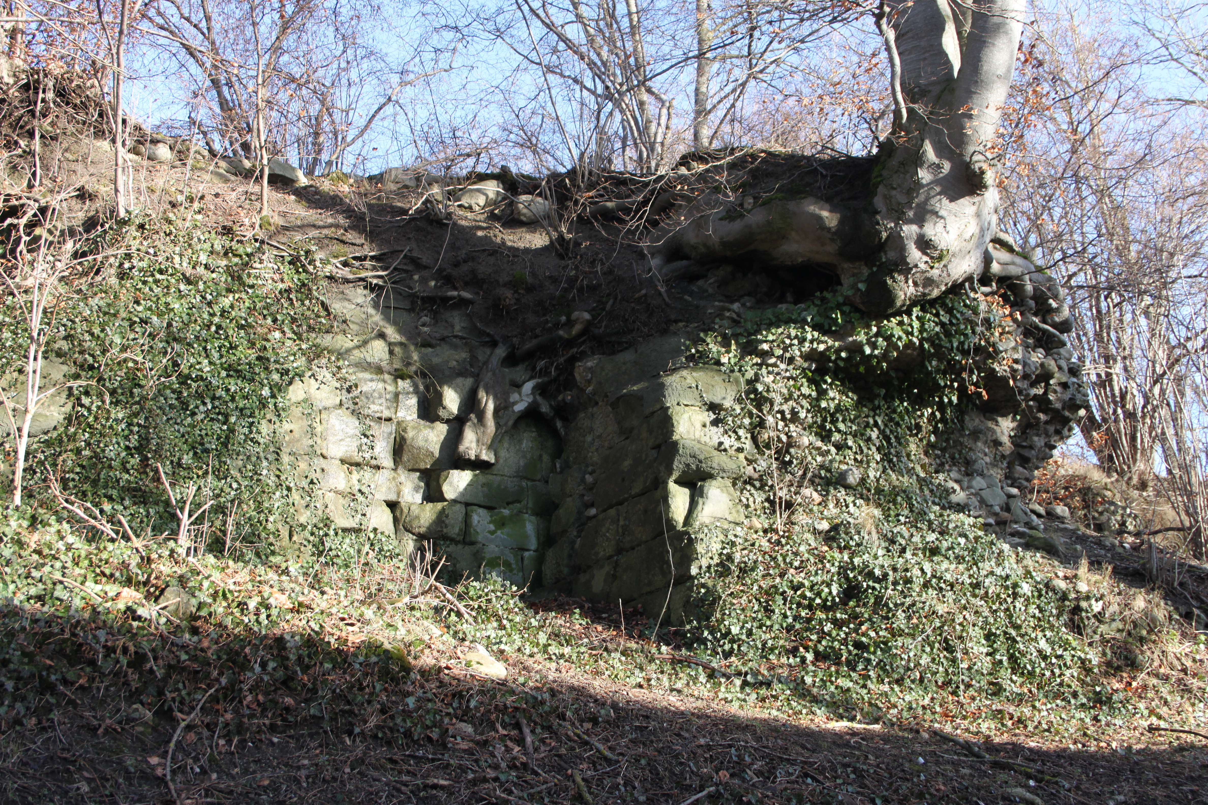 Vue des ruines du château de Villarsel-le-Gibloux, en janvier 2018